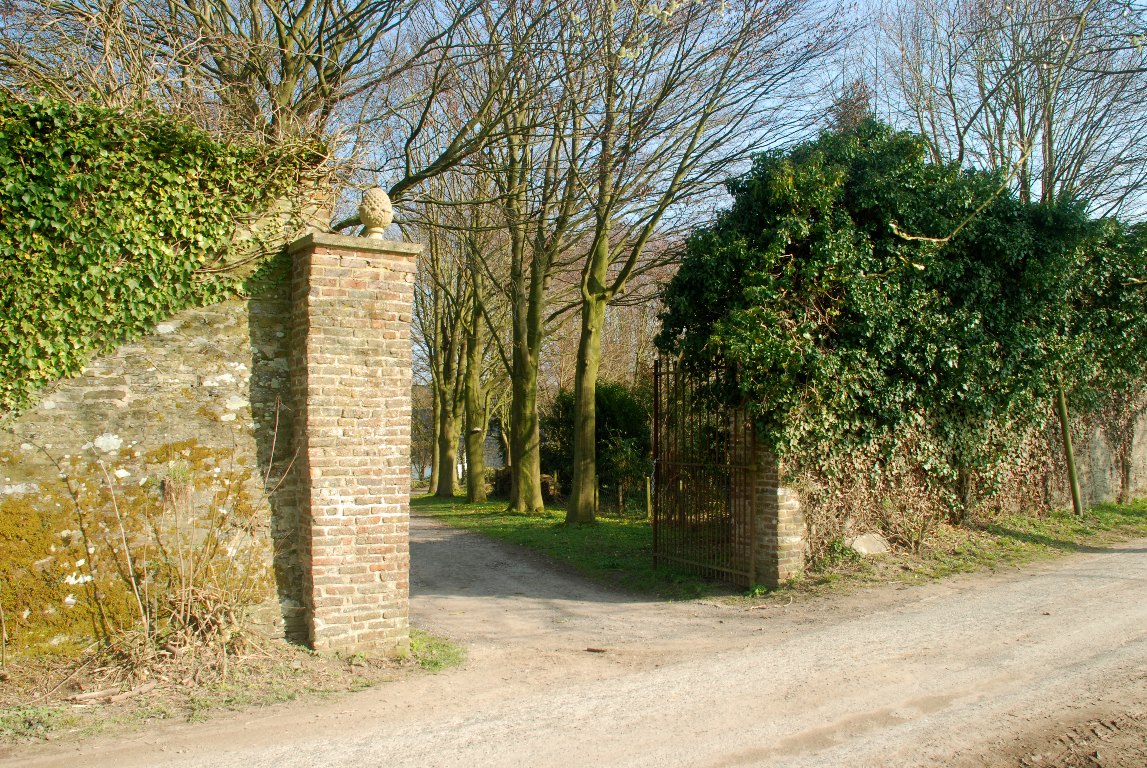 Belgique - Brabant wallon - Mur d'enceinte de l'abbaye de Villers-la-Ville